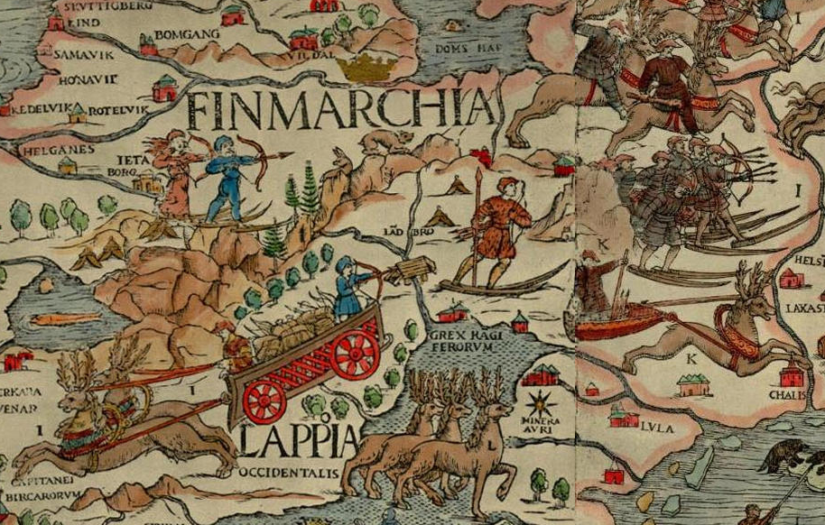 Skieurs finnois, détail de la carte d'Olaus Magnus.